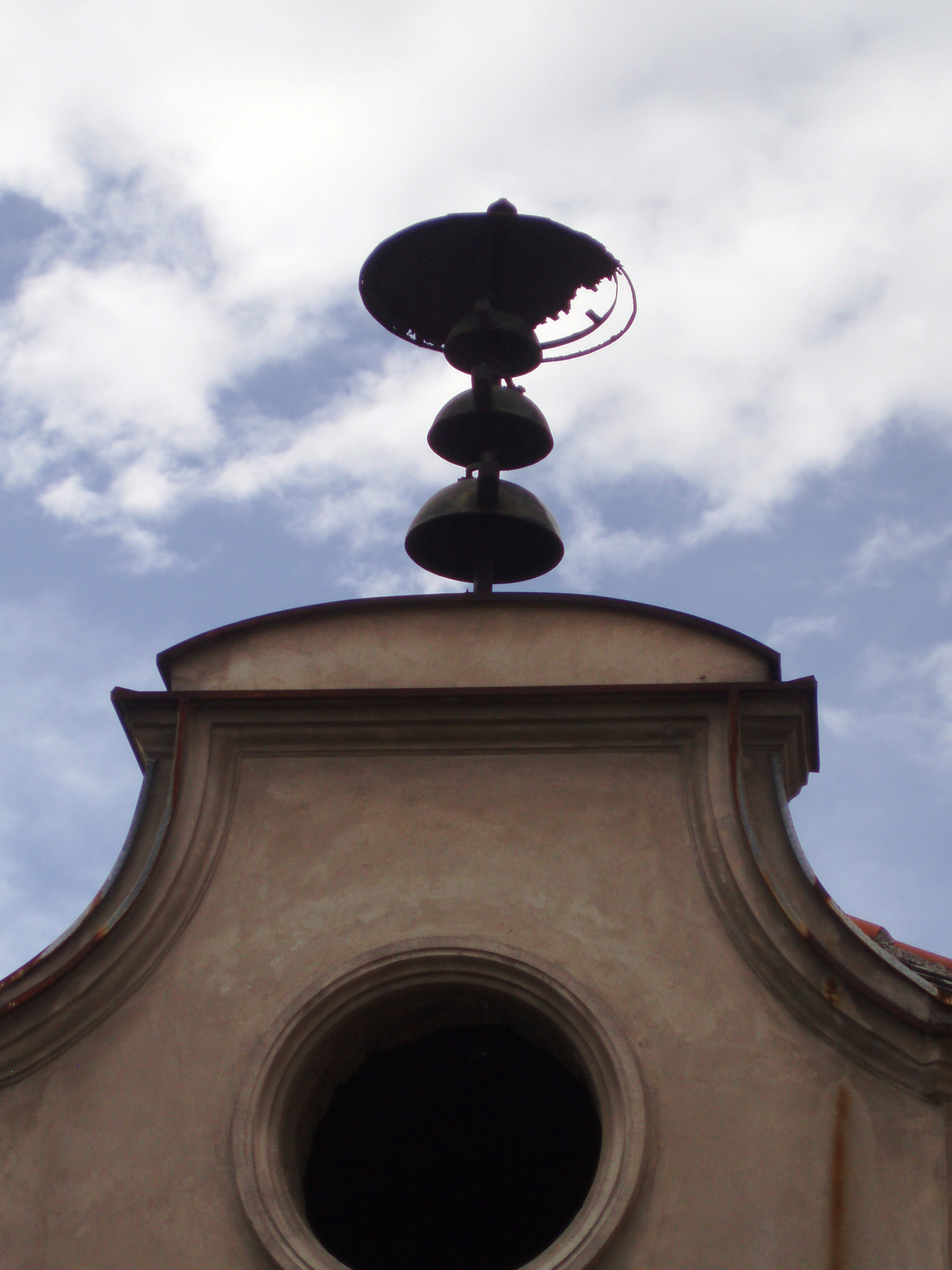 Livnica Pantelić prostor na zabatu za sat i zvono za oglašavanje 15min, pola sata i pun sat, autor fotografije: Nicolo